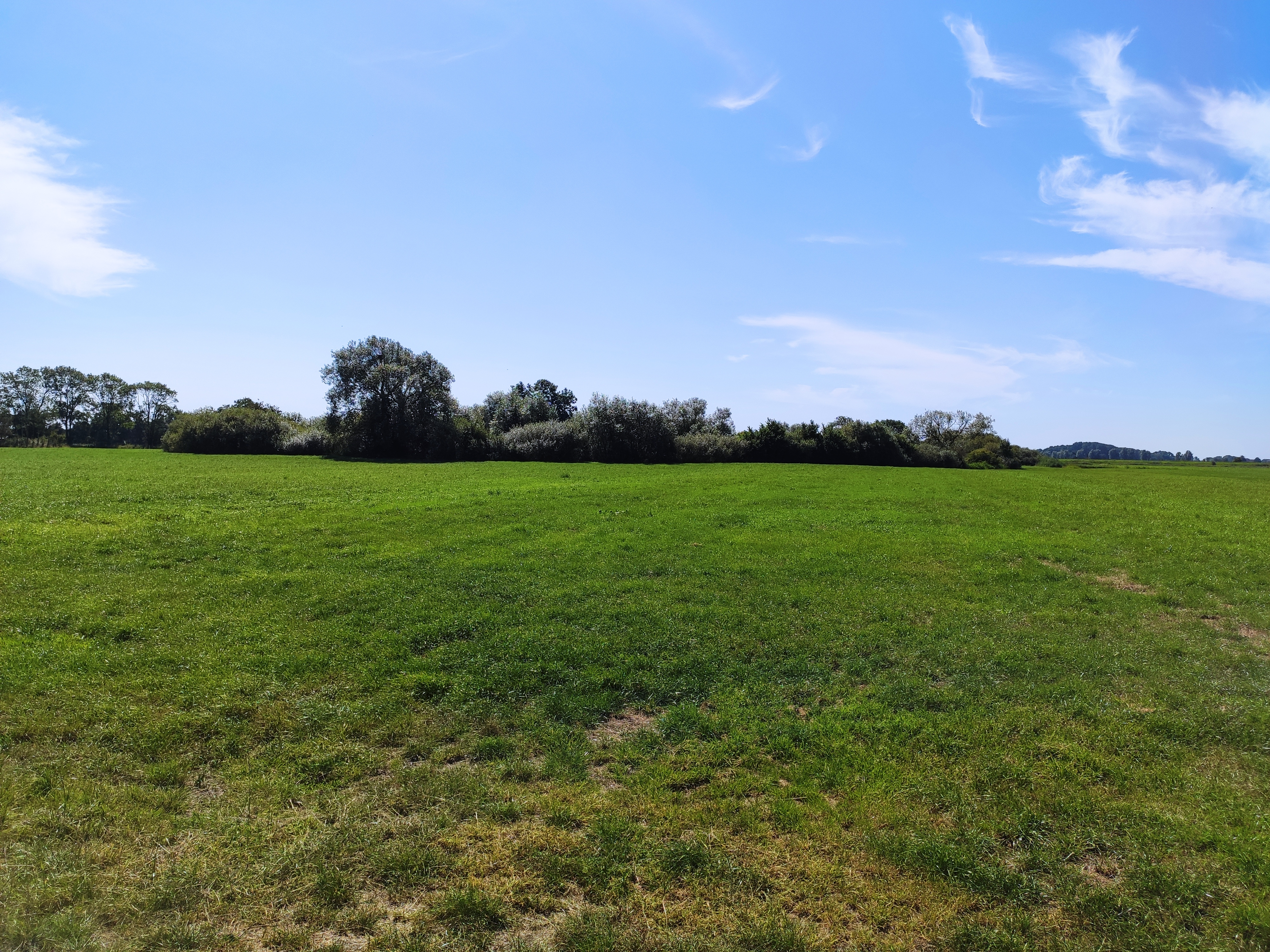 Foto von Fort Dykhausen